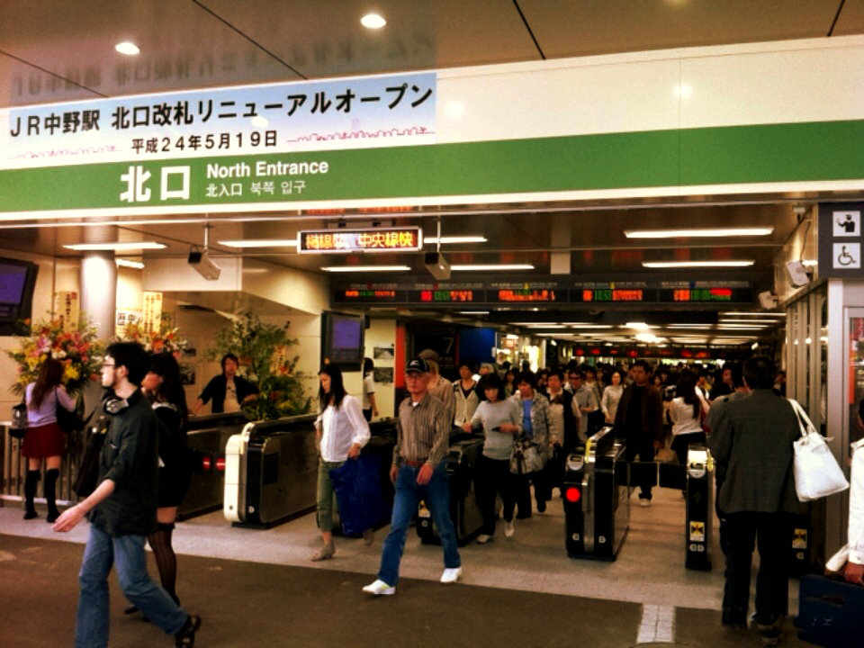 リニューアルされた中野駅北口